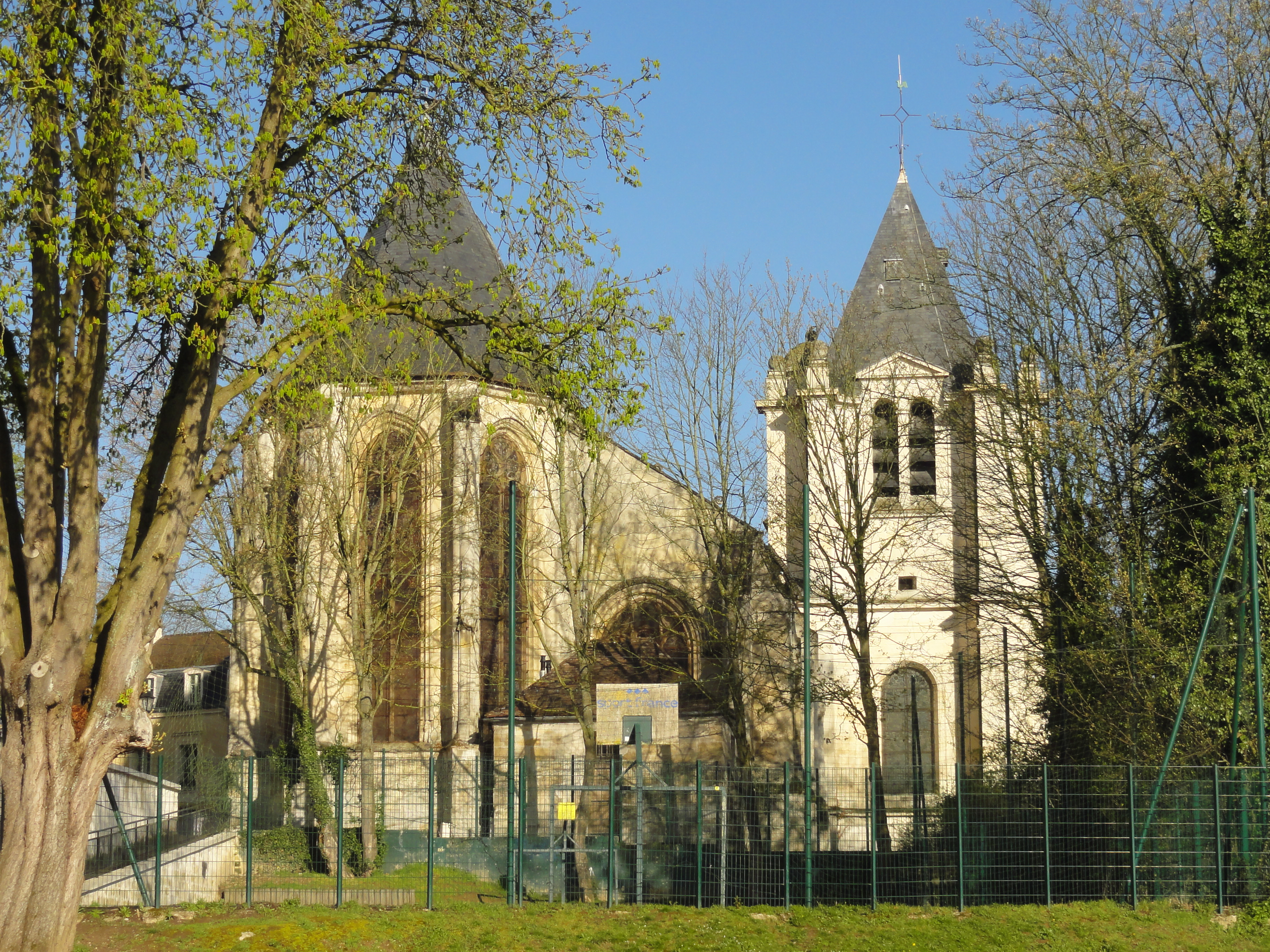 Église Saint-Acceul d'Écouen - voir titre.